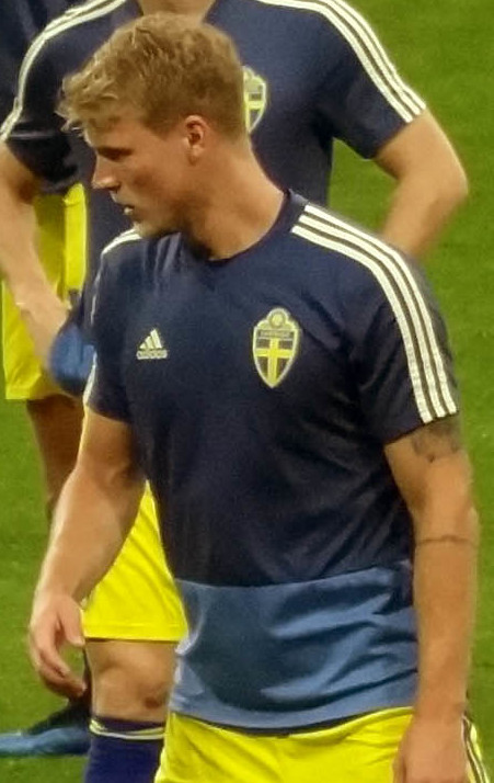 23 июня 2018 года на ЧМ-2018 сборная Германии выиграла на стадионе «Фишт» Швецию со счётом 2:1.